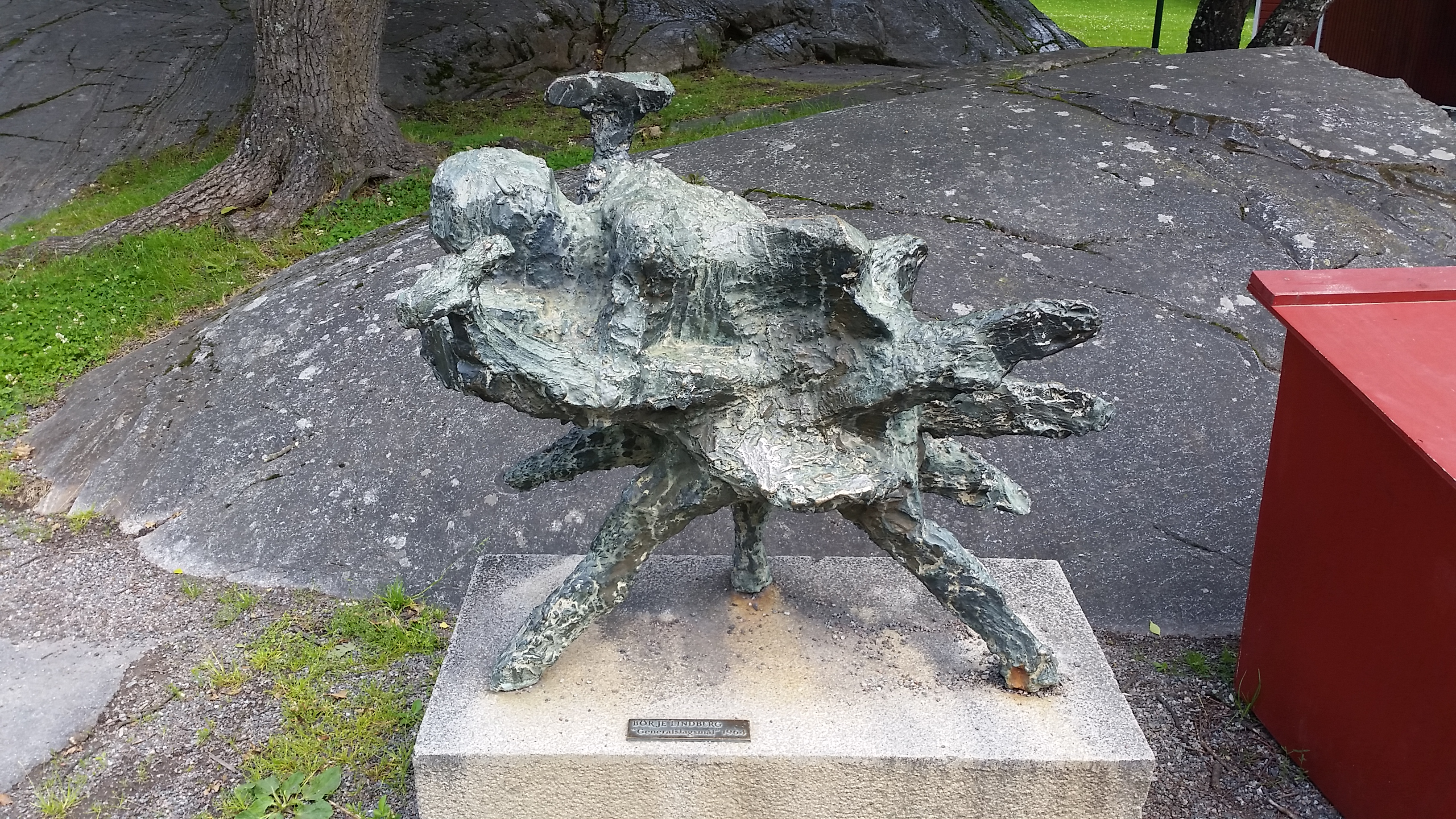 Generalslagsmål (1962) - Börje Lindberg. Solna, Sverige. It is not clear whether freedom of panorama applies to this image. This is a depiction of a building or work of art in Sweden. The depicted work is believed to be protected by copyright. According to Article 24 of the Swedish copyright act, "Works of art may be depicted if they are permanently placed on or at a public place outdoors. Buildings may be freely depicted." It has been widely accepted that this provision made distribution of depictions such as this one legal. On 4 April 2016, however, the Supreme Court of Sweden issued a statement that Article 24 does not extend to publication in online repositories, and on 6 July 2017, a lower court ruled that linking to depictions of copyrighted artworks hosted on Commons constitutes copyright infringement. See COM:CRT/Sweden#Freedom of panorama for more information. The implications of these decisions on Commons' ability to continue to distribute this and other depictions like it are currently under analysis. Reusing or linking to this file may have legal consequences. You are solely responsible for ensuring that you do not infringe the copyright belonging to someone else. See our general disclaimer for more information.